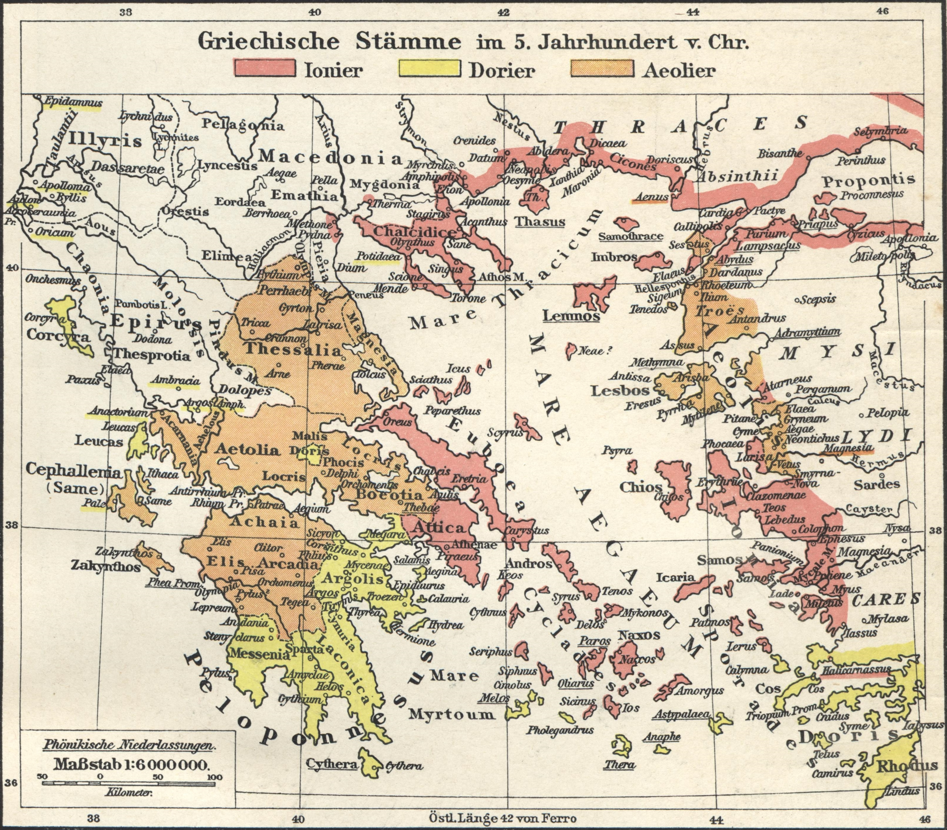 Griechische Stämme im 5. Jahrhundert v. Chr.